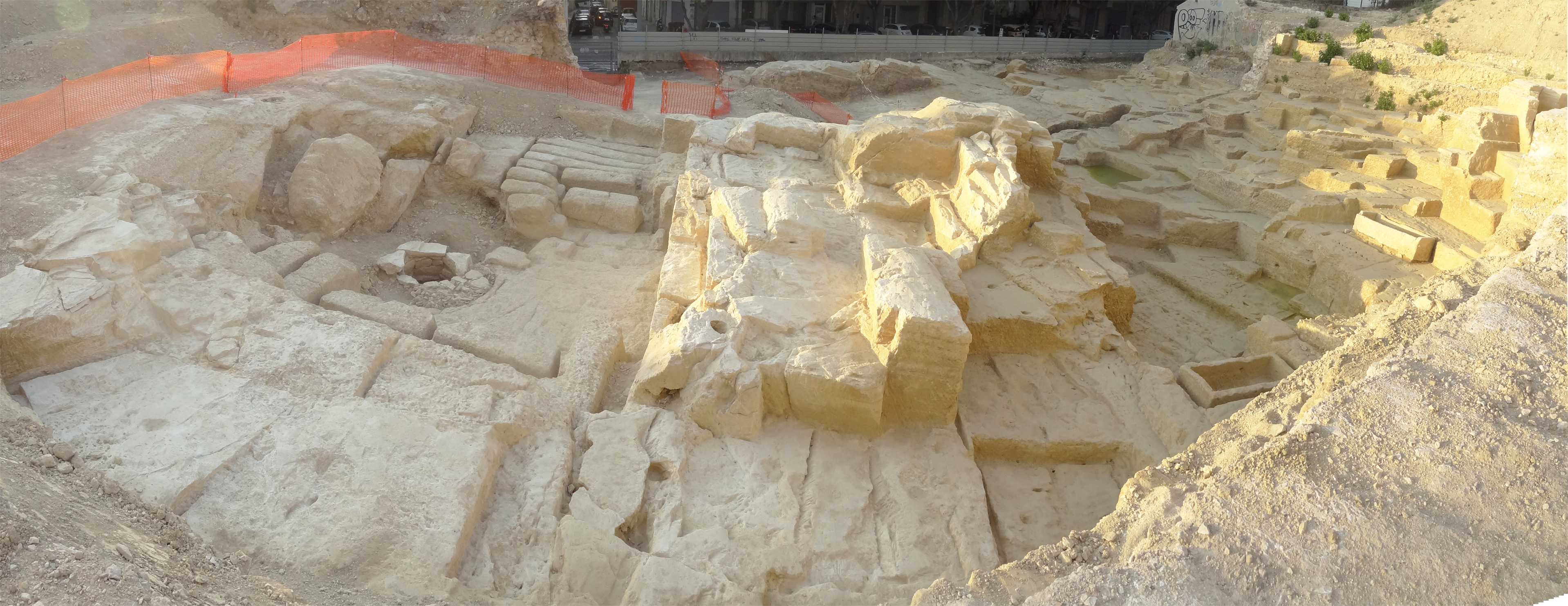 vue panoramique du site archéologique de la Corderie, photo prise dos au rempart de Louis XIV, au fond le bd de la Corderie